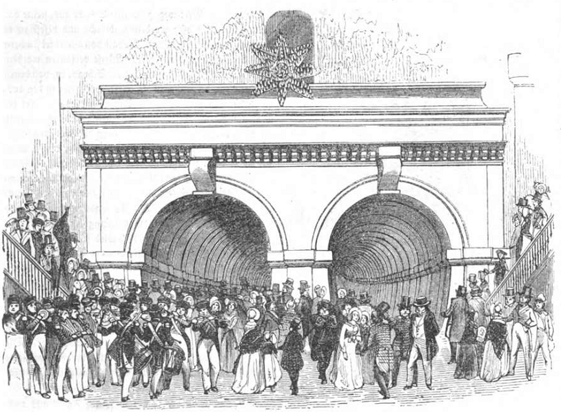 Tunneleingang an der Flußseite von Rotherhithe.